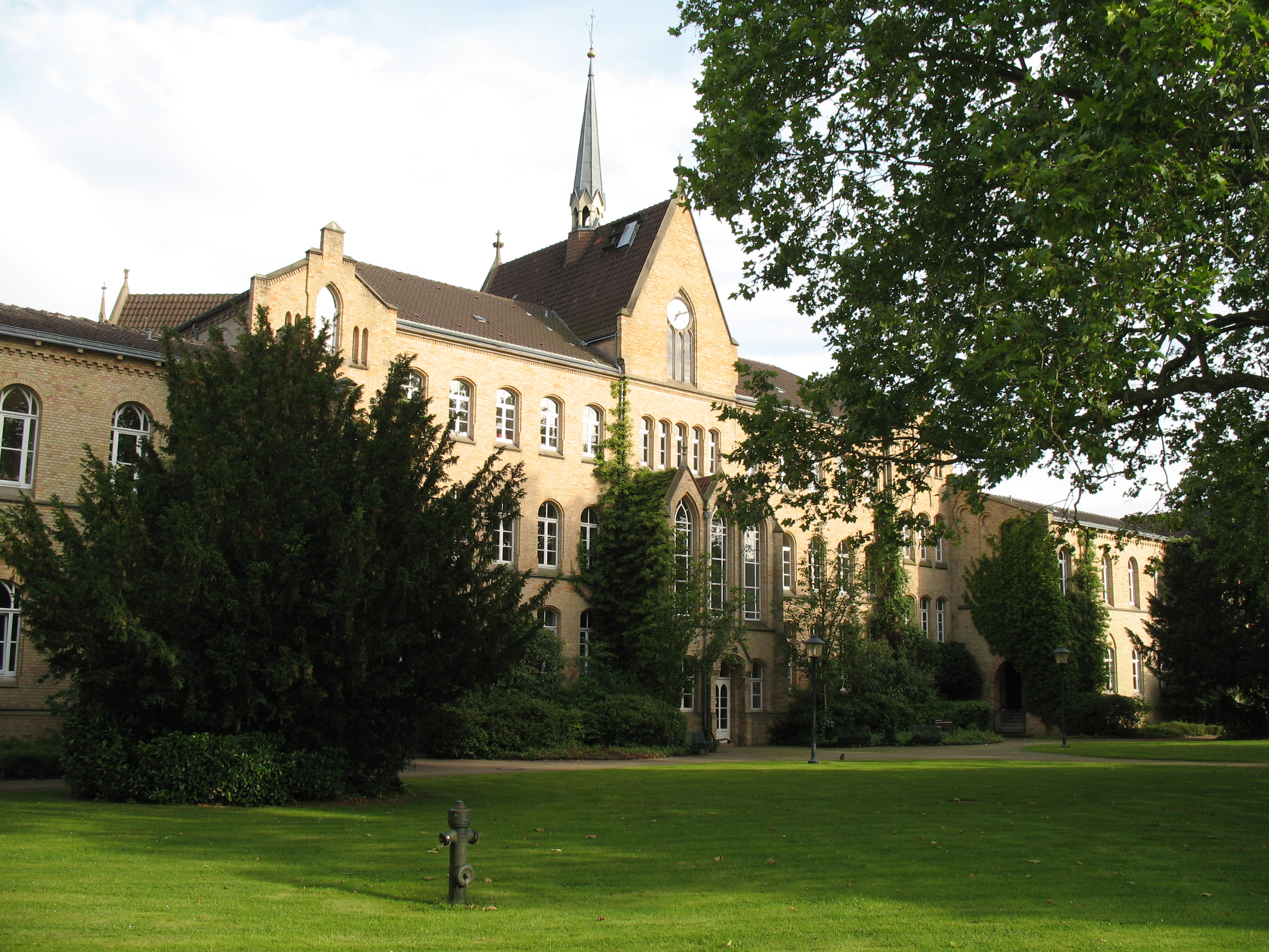 Blick auf eines der zentralen Gebäude des Asklepios Fachklinikums Göttingen (ehem. Landeskrankenhaus, früher "Irrenanstalt"), lt. Dehio (Band Bremen/Niedersachsen, München 1992) erbaut 1862-64 nach Plänen von Rasch und Funk (neugotischer Gebäudekomplex)